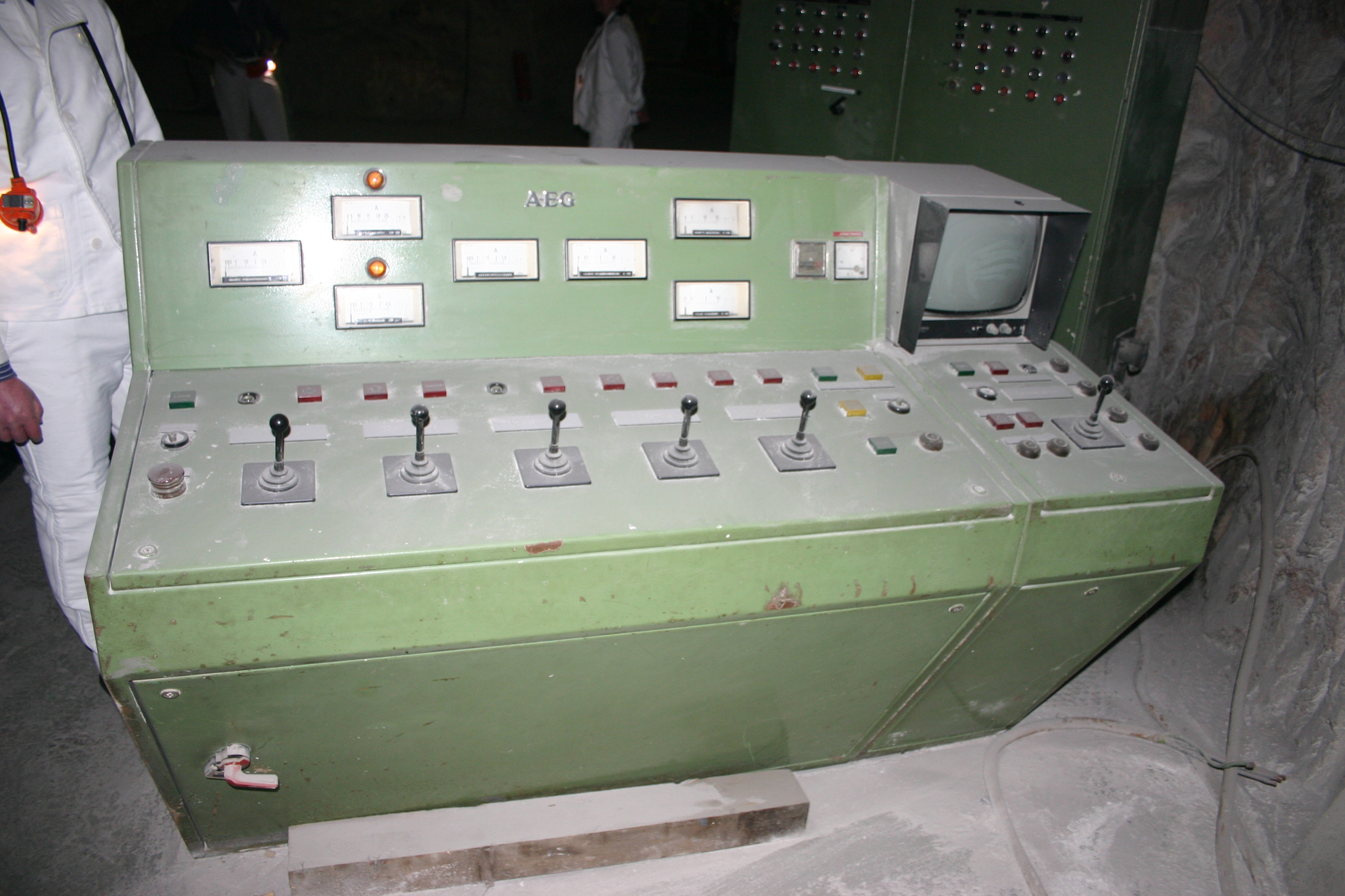 Steuerpult der Krananlage mit der die Fässer mit mittelaktivem Abfall in die Kammer 8a des Bergwerks Asse II abgelassen wurden. Der Bildschirm rechts bot einen Blick in die Kammer 8a.